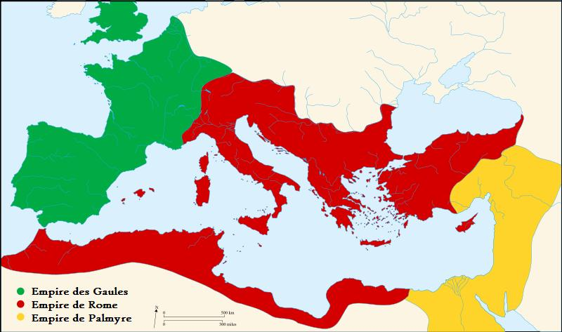 Carte de l'Empire romain et des Empires des Gaules et de Palmyre après leur sécession. 271 AP.J.C.